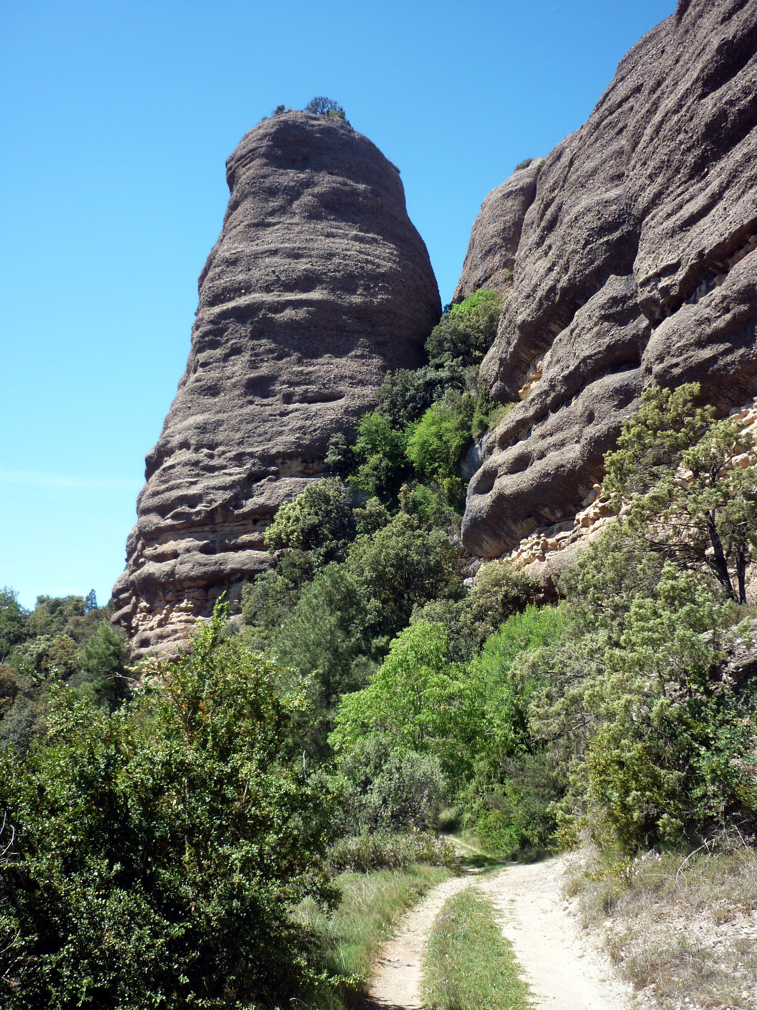 Agulla a la Roca del Corb This is a a photo of a natural area in Catalonia, Spain, with id: ES510175